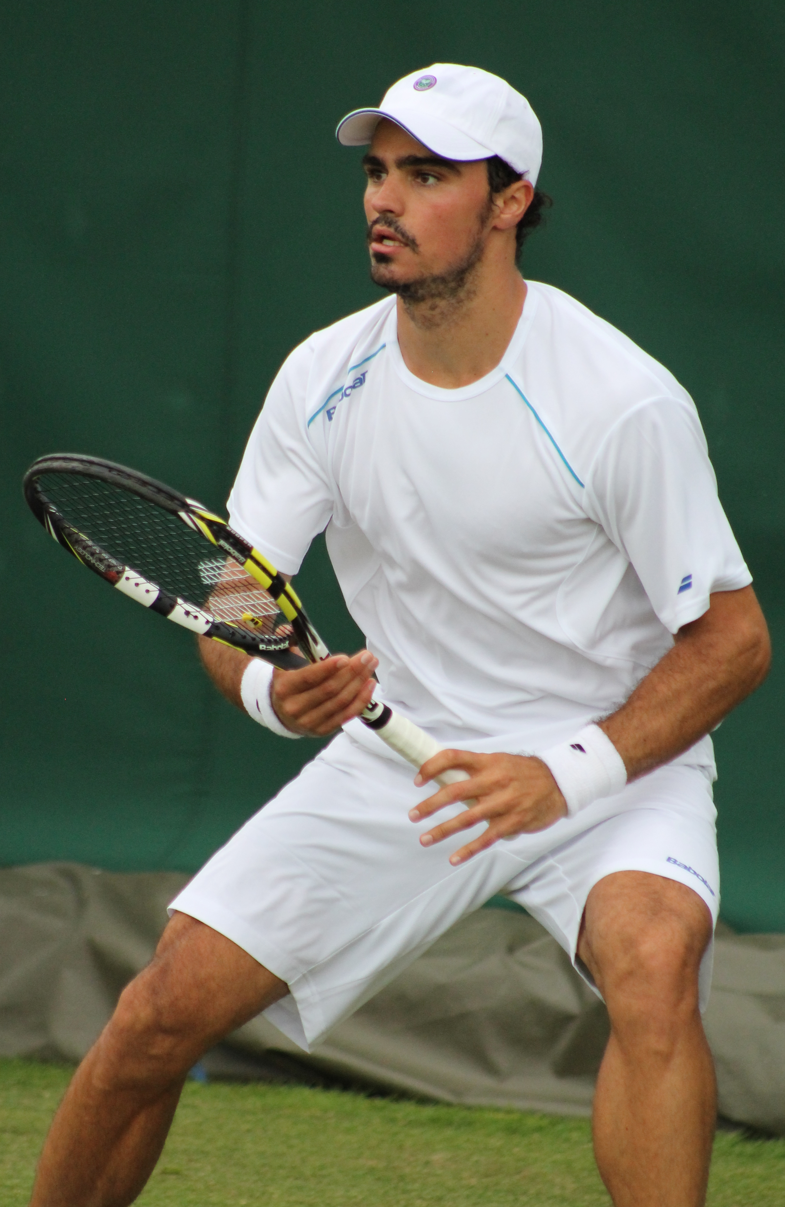 Collarini WMQ14 (16)